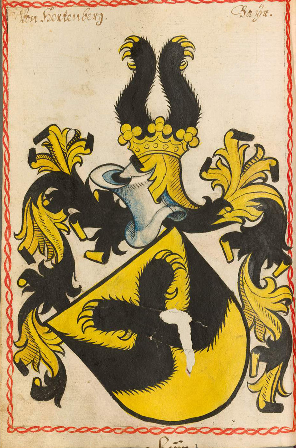 Scheibler'sches Wappenbuch , älterer Teil; Seite 276 Von Hertenberg Bayern